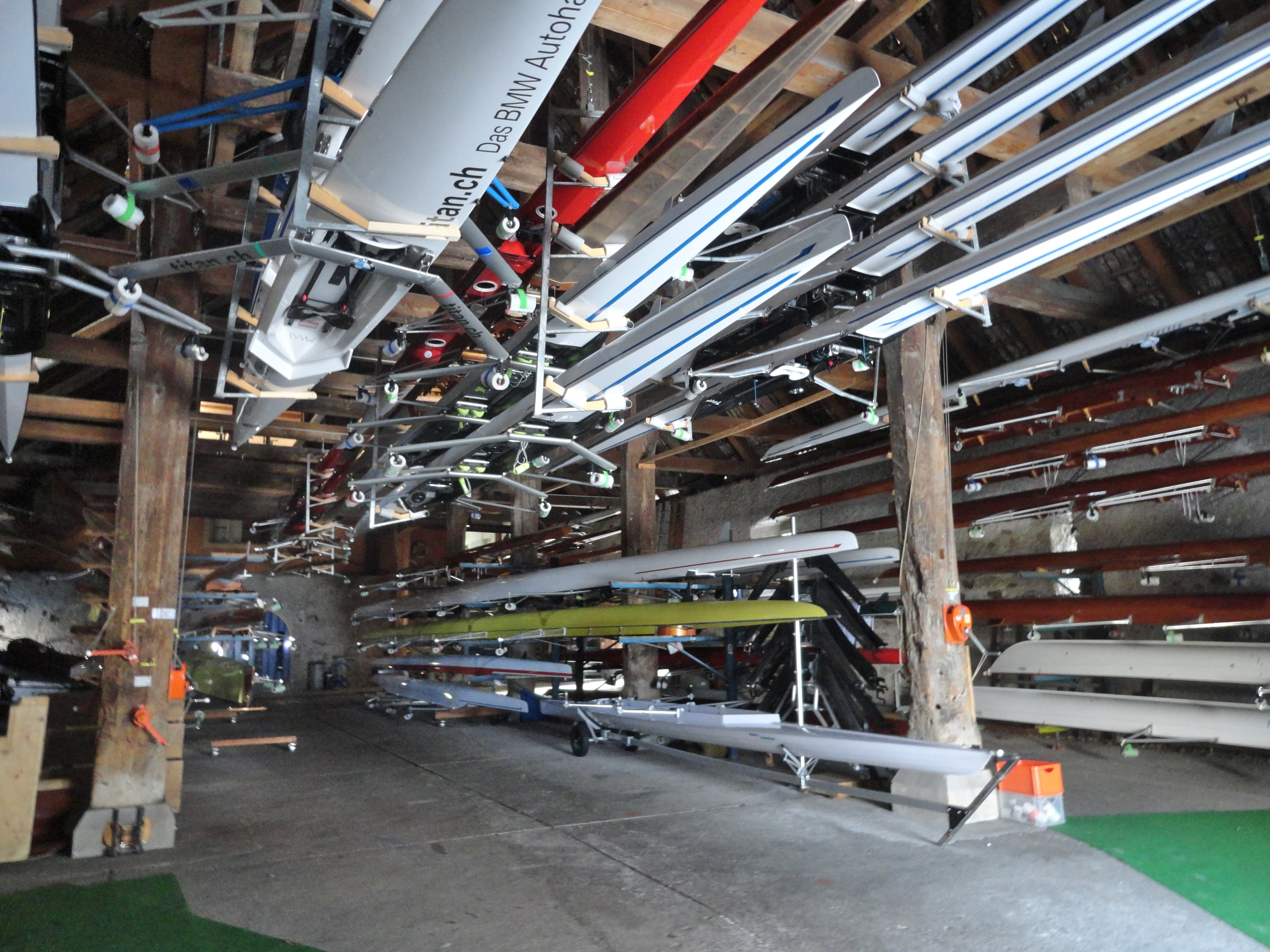 Zehnentrotte Innenraum